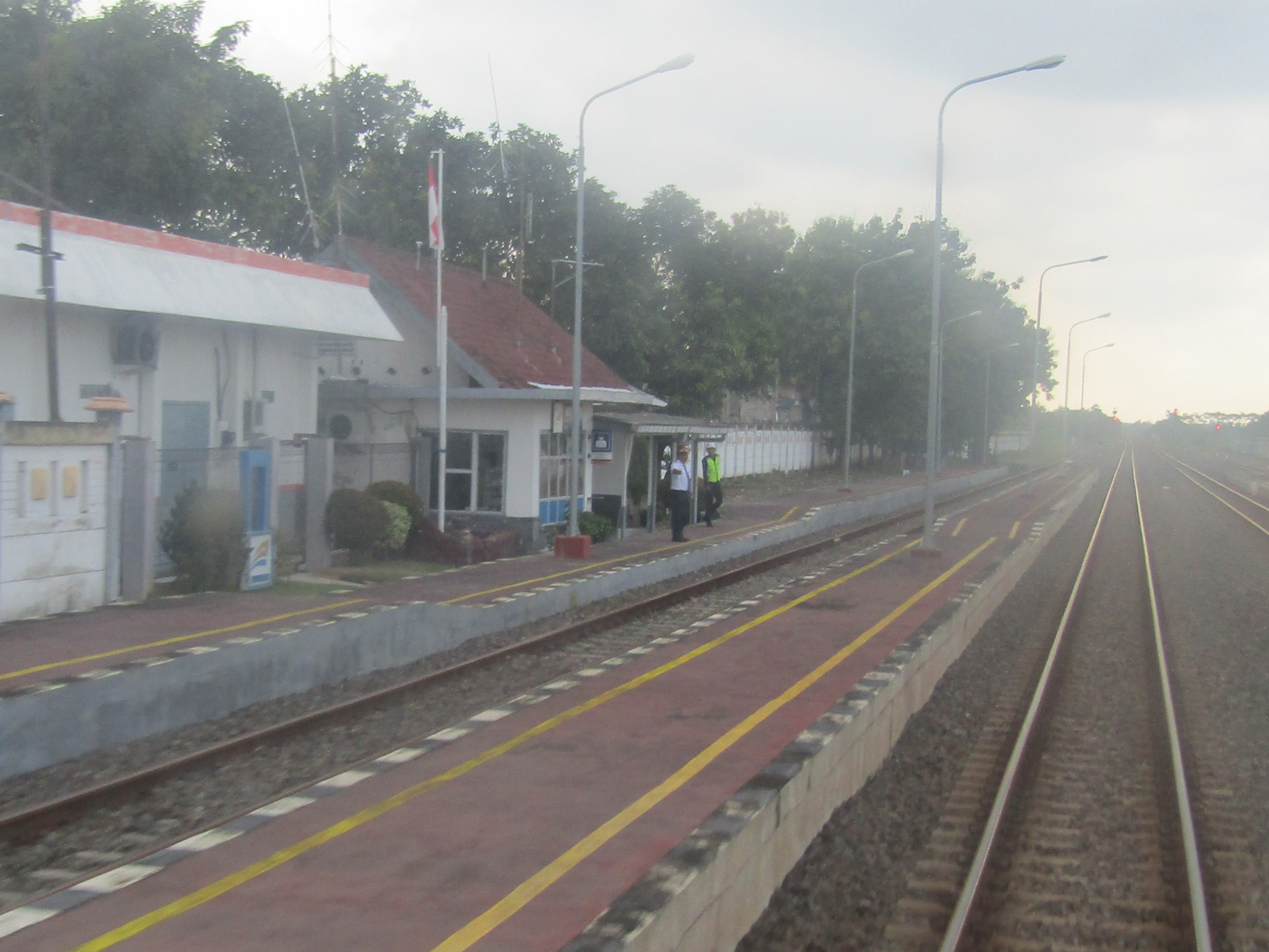 Tampak peron bangunan Stasiun Jerakah, 2019, dengan PPKA tunjuk-sebut Semboyan 1.